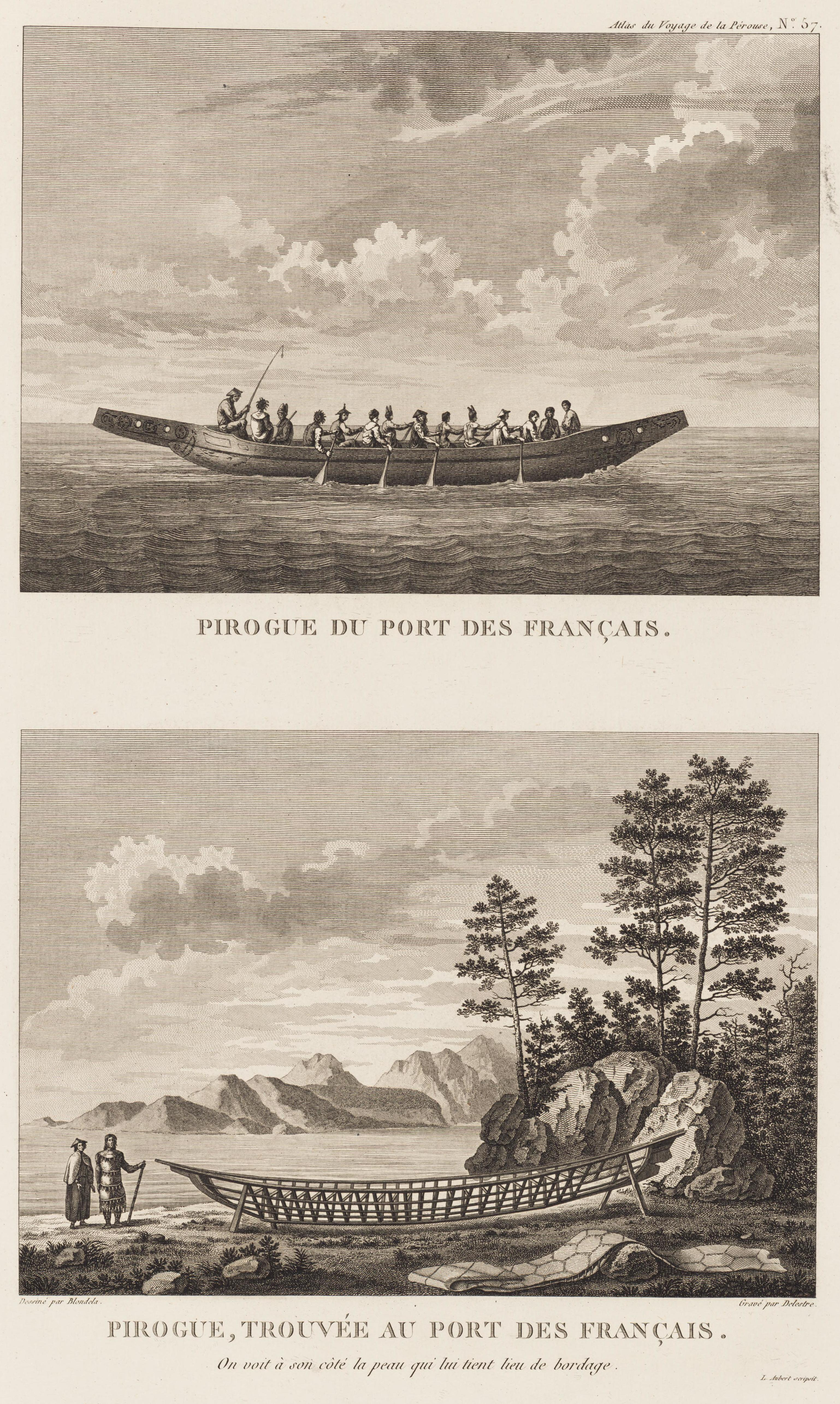 Voyage de La Pérouse autour du monde /publié conformément au décret du 22 avril 1791, et rédigé par L.A. Milet-Mureau.